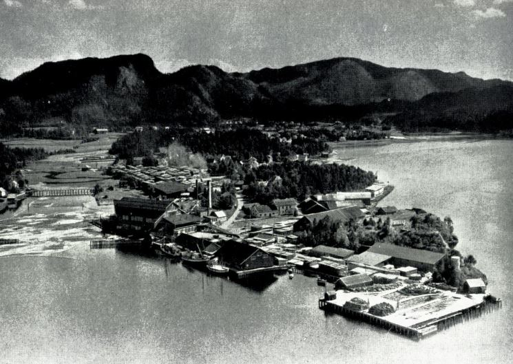 Bangdalsbruket på Bangsund i daværende Klinga herred.